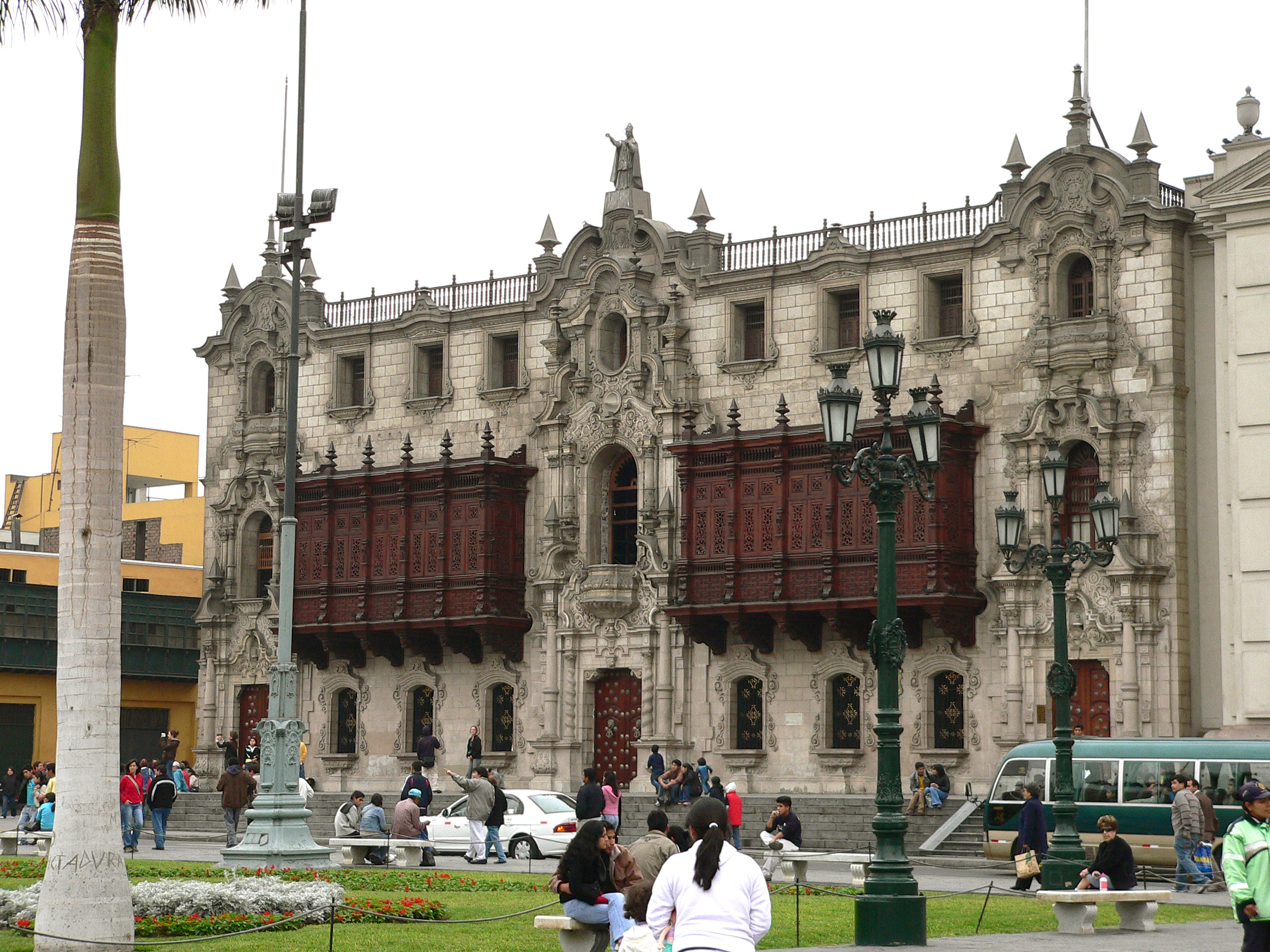 Descripción: Palacio Arzobispal de Lima Lugar: Centro Histórico de Lima Distrito : Cercado de Lima Ciudad : Lima País : Perú Fotógrafo: © Manuel González Olaechea y Franco Fecha de la foto : 8 de julio de 2007